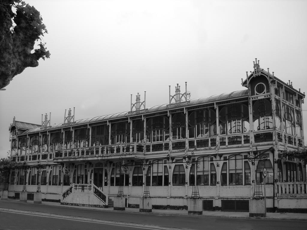 A Terraza, Sada, fachada dianteira